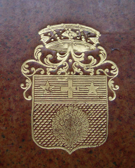 armoriies des barons Pavée de Vendeuvre figurant sur un ouvrage de leur bibliothèque